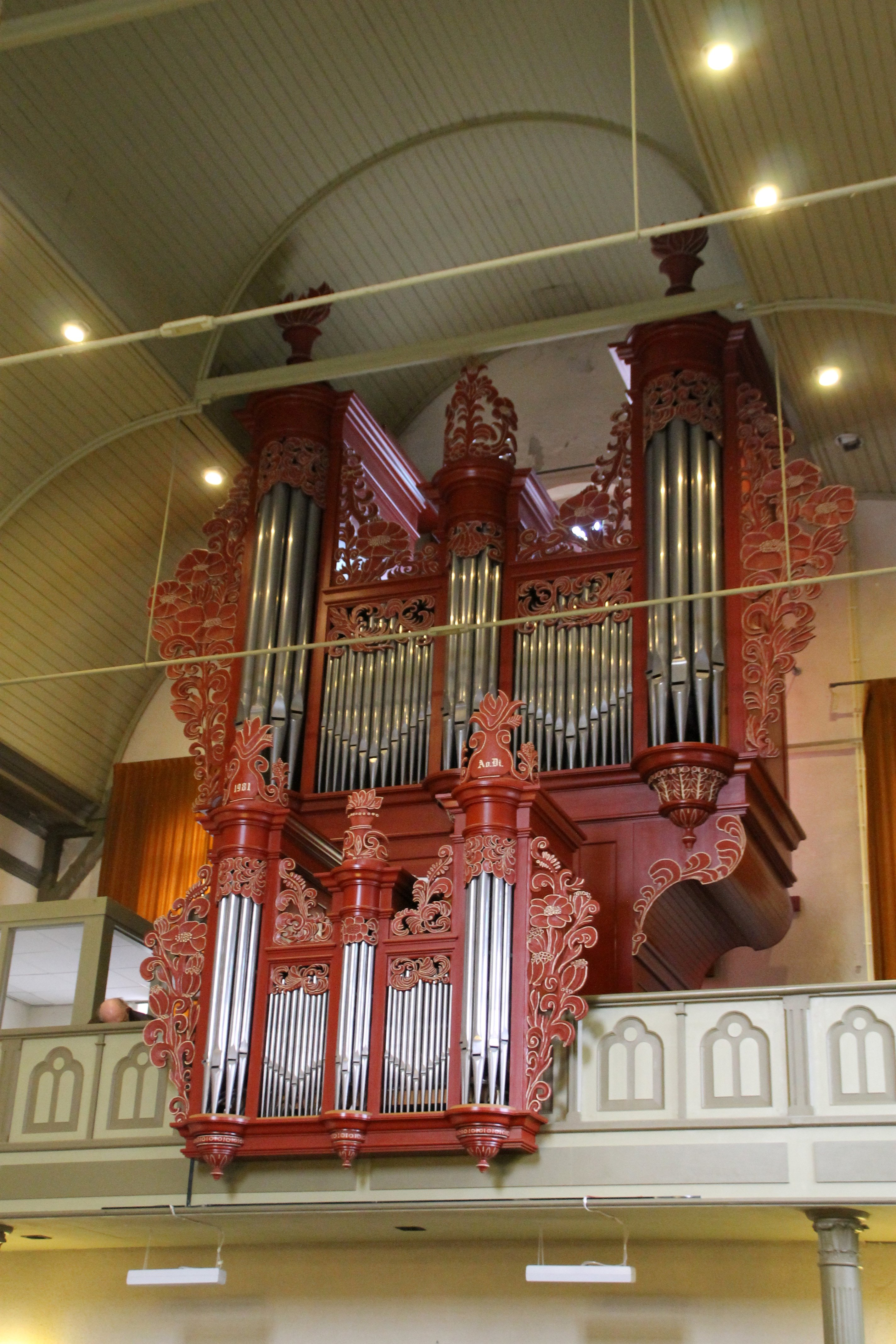 Assen - Bethelkerk - Groningerstraa - orgel